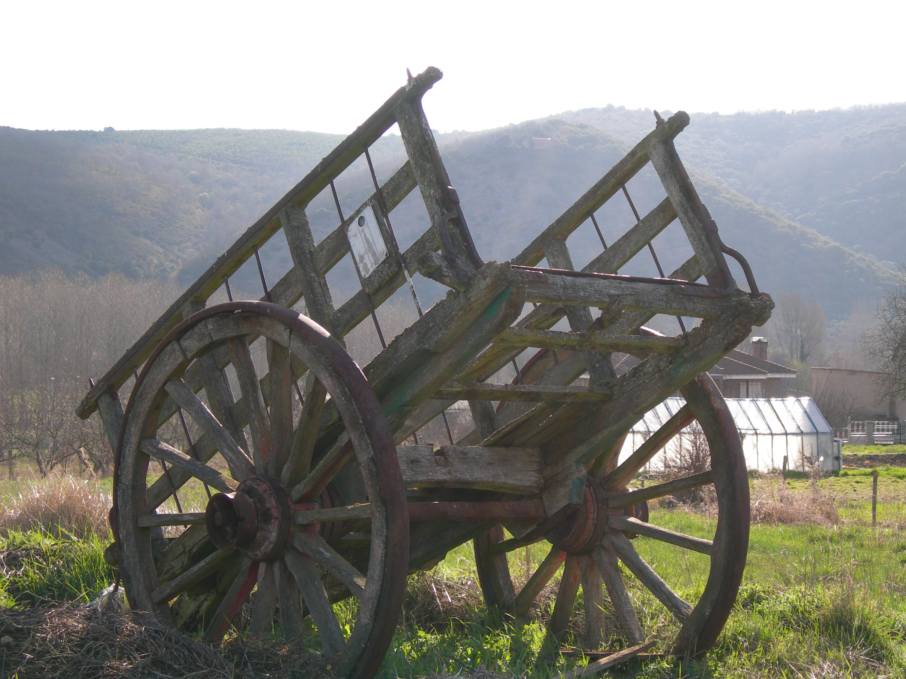 Tipico carro agrícola de madera y hierro.